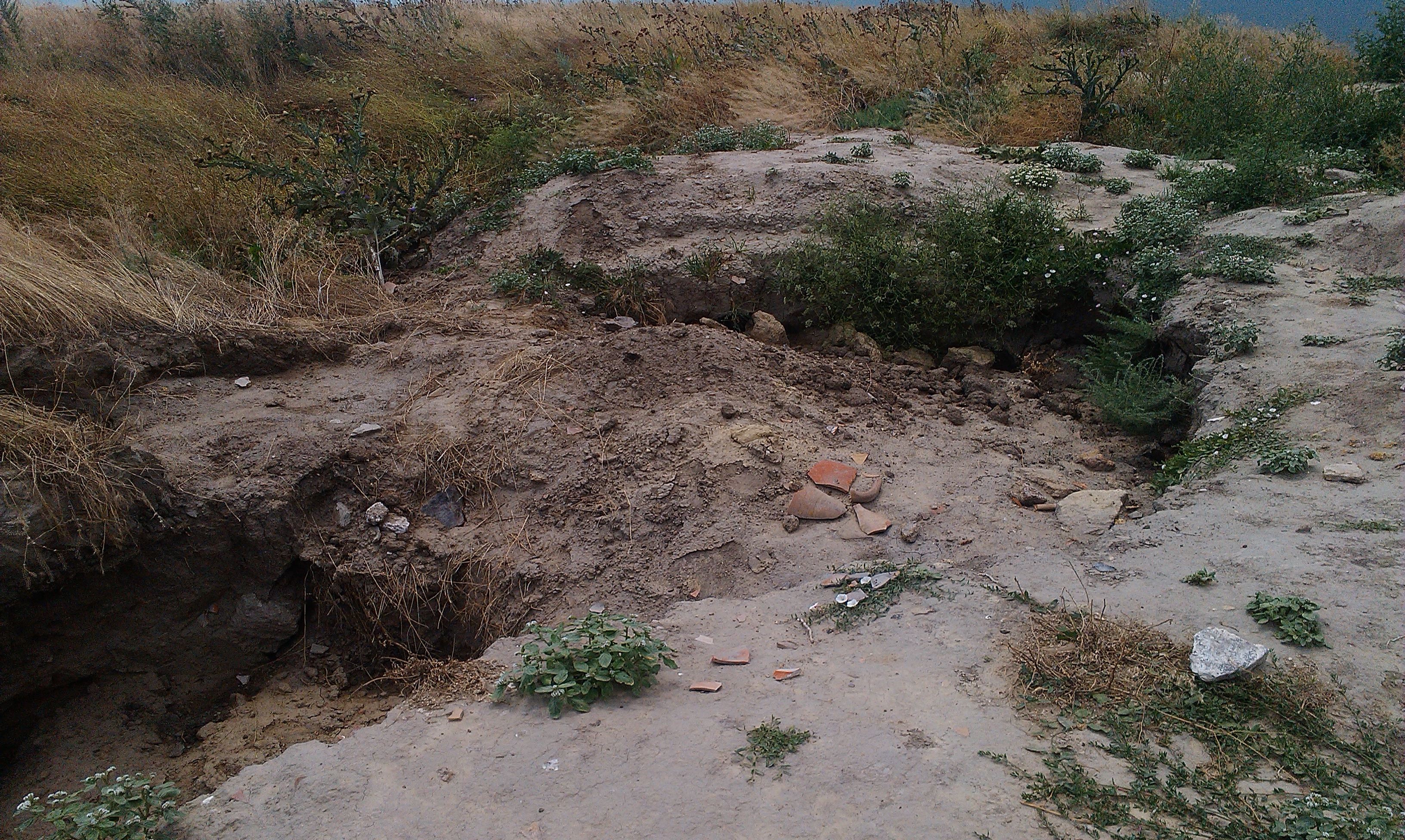 Фрагменти кераміки.